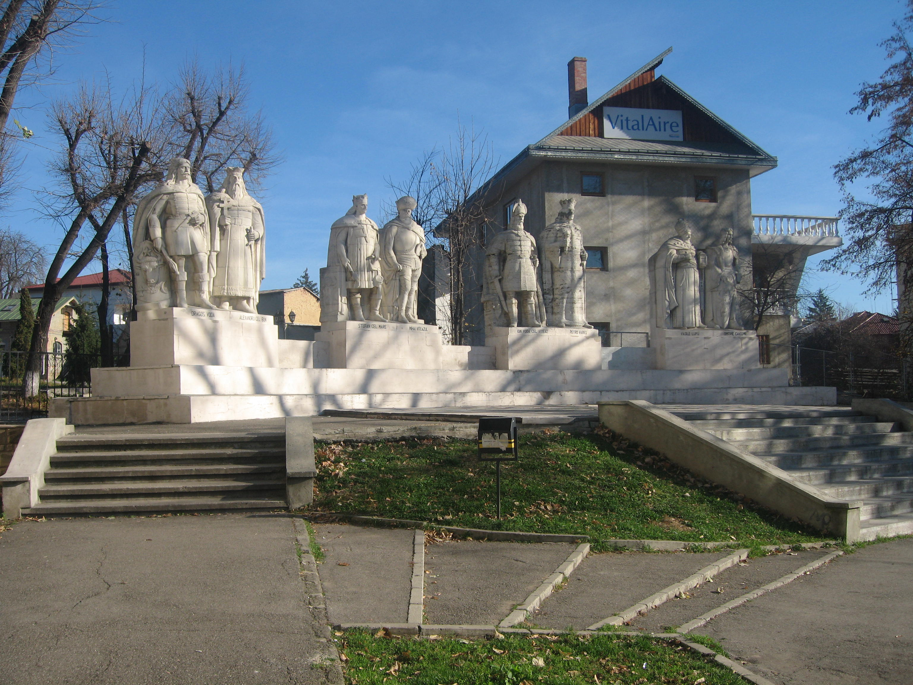 Grupul Statuar al Voievozilor din Iași